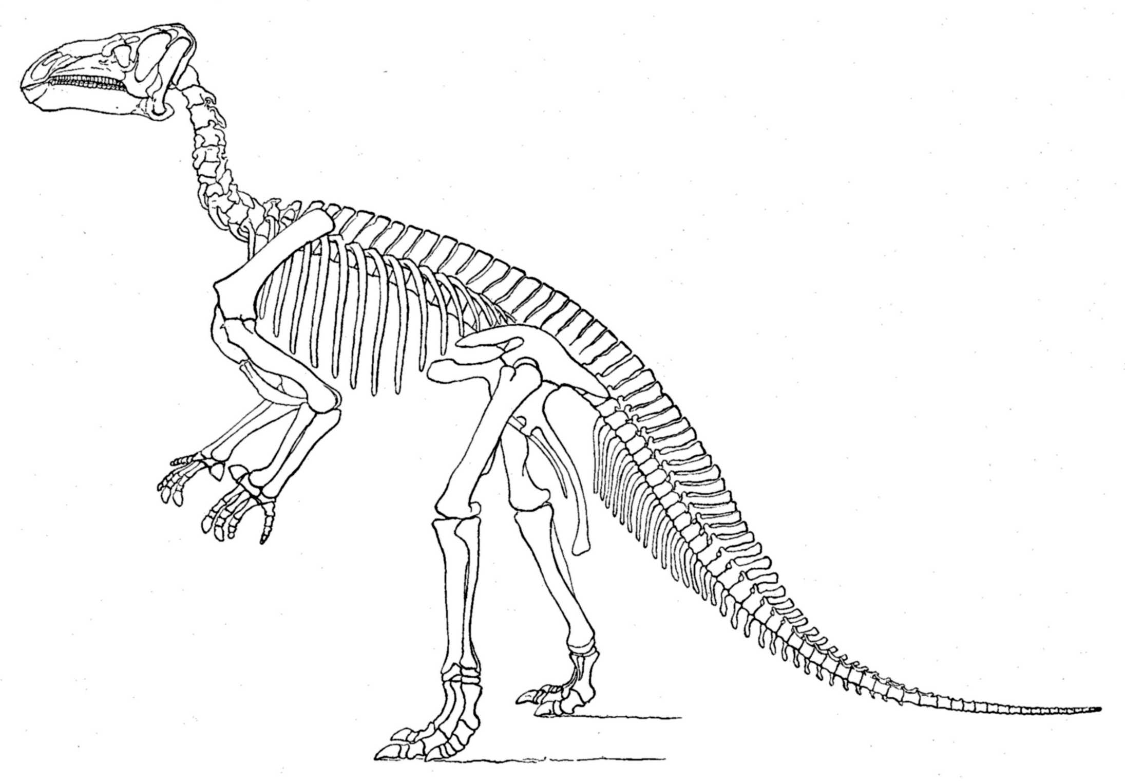 Iguanodon Bernissartensis skeleton.